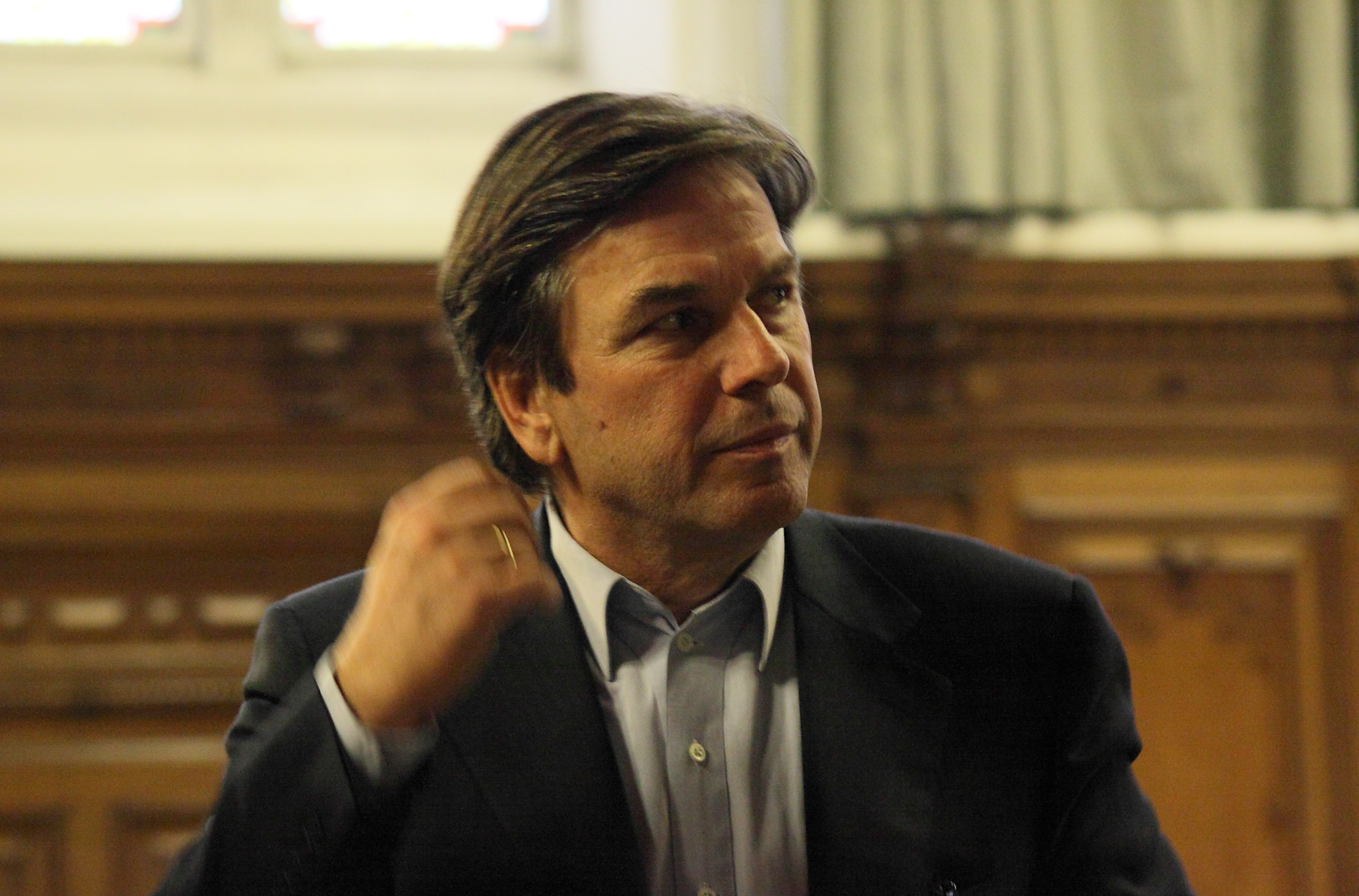 Franz Voves, Steirischer Landeshauptman (SPÖ)